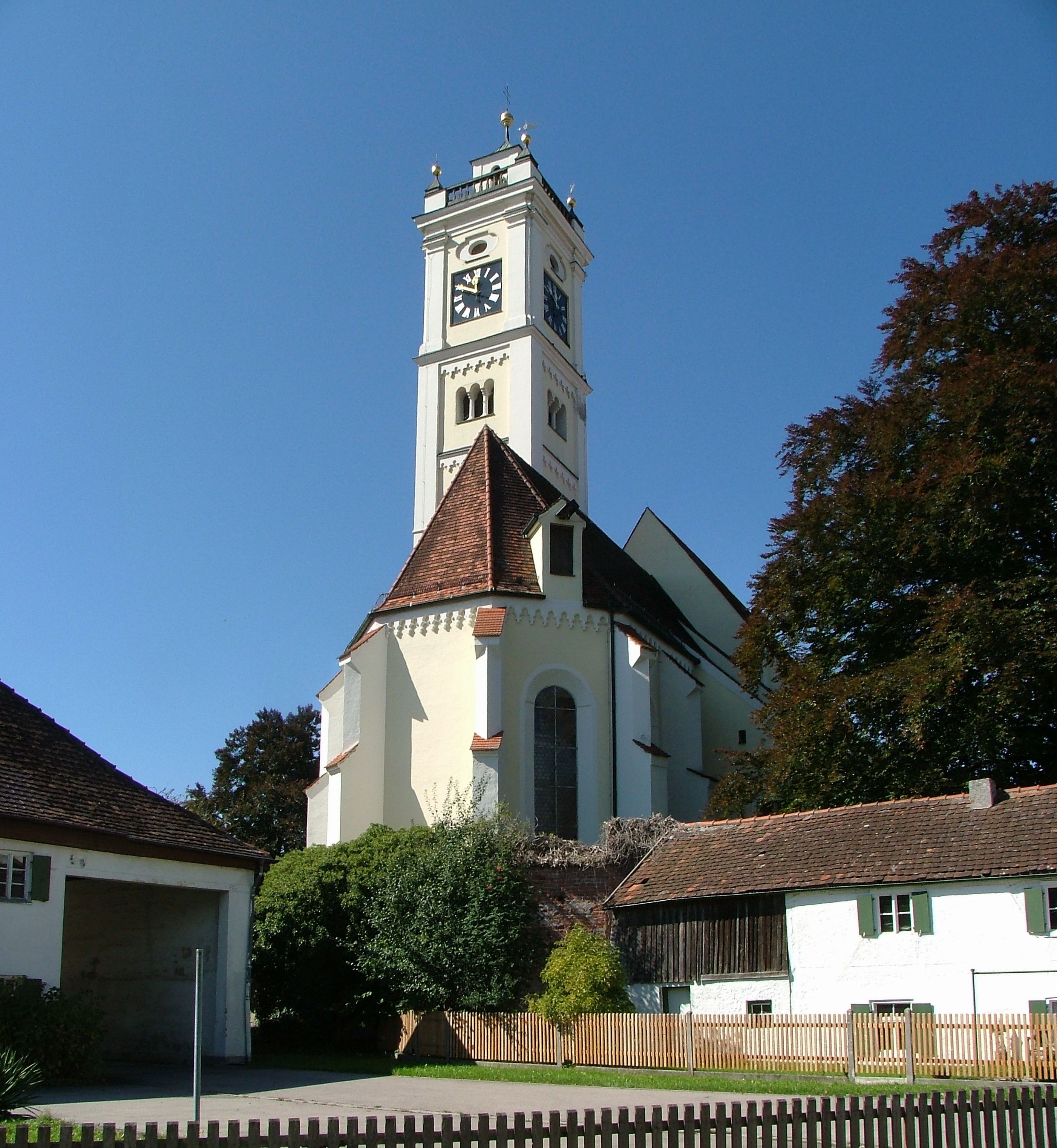 Türkheim